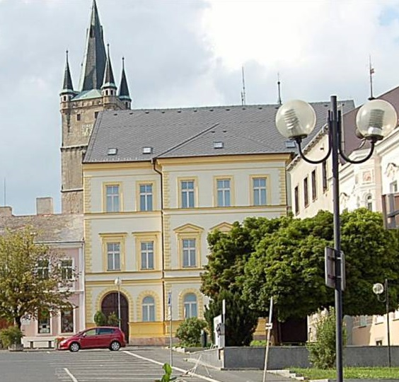 Tachov, náměstí Republiky. Budova okresního soudu.